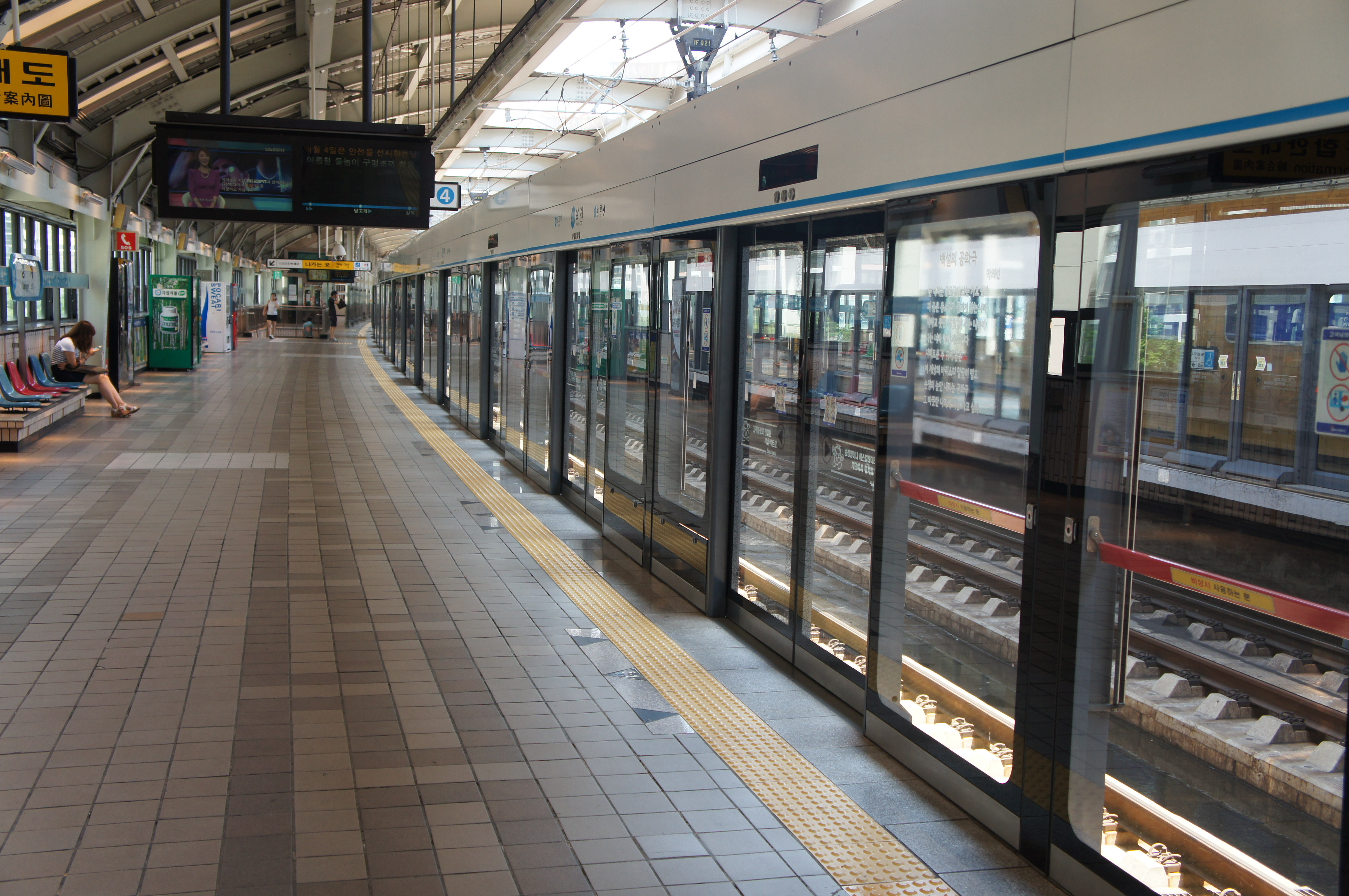 상계역 승강장